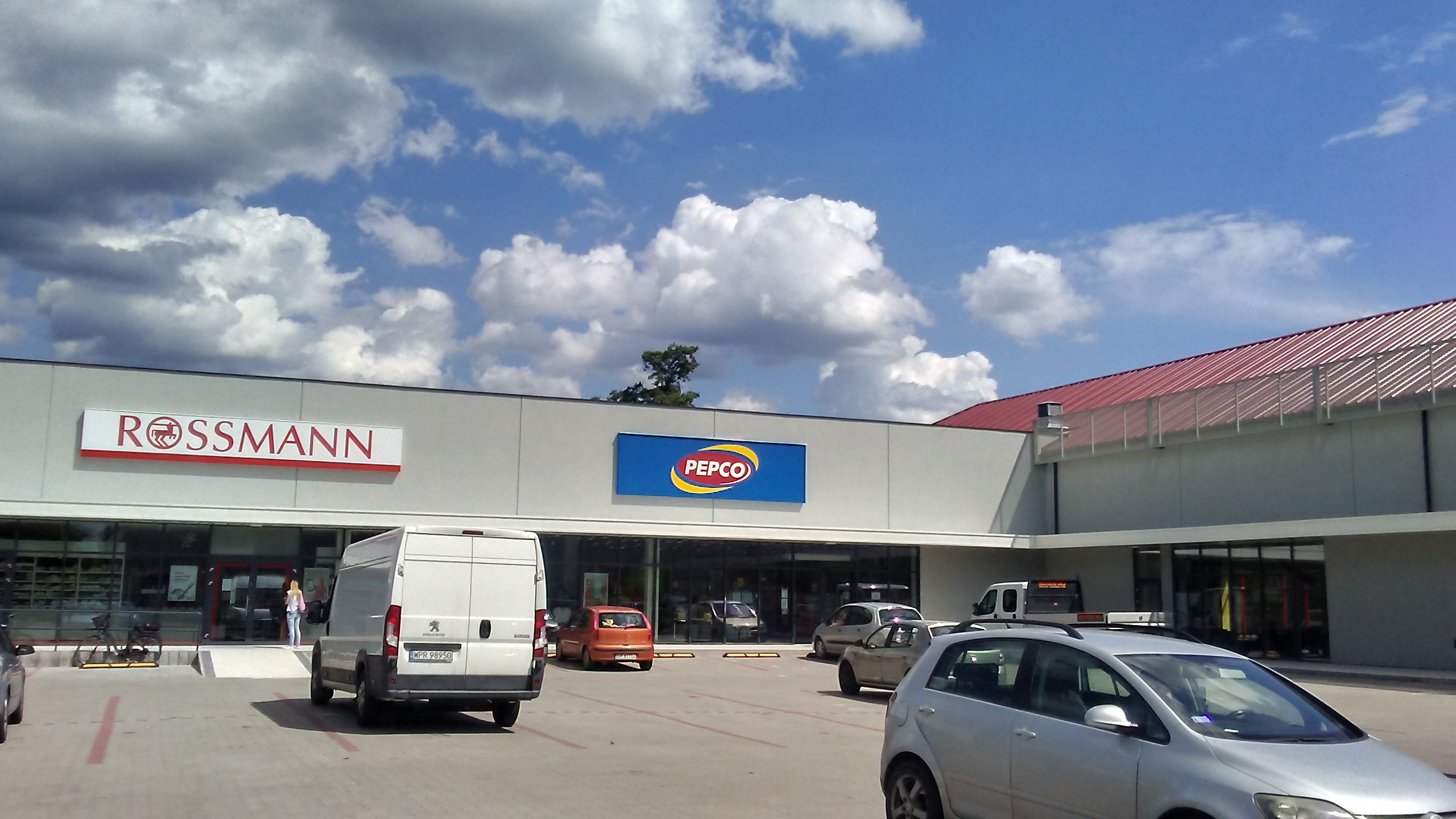 Pasaż handlowy „Niebrów”, Tomaszów Mazowiecki, ulica Dzieci Polskich